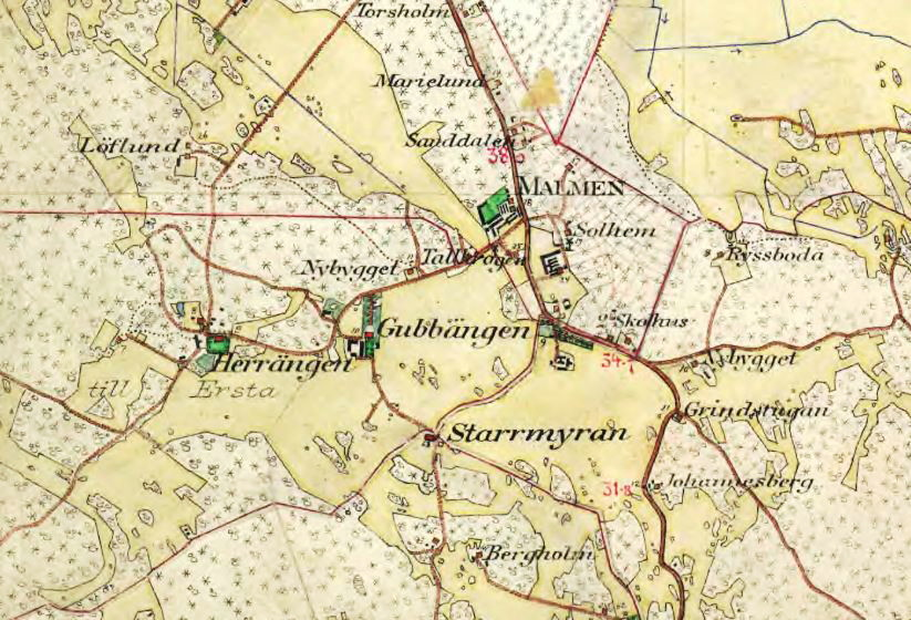 Del av Häradsekonomiska kartan visande Herrängens gård och Gubbängens gård